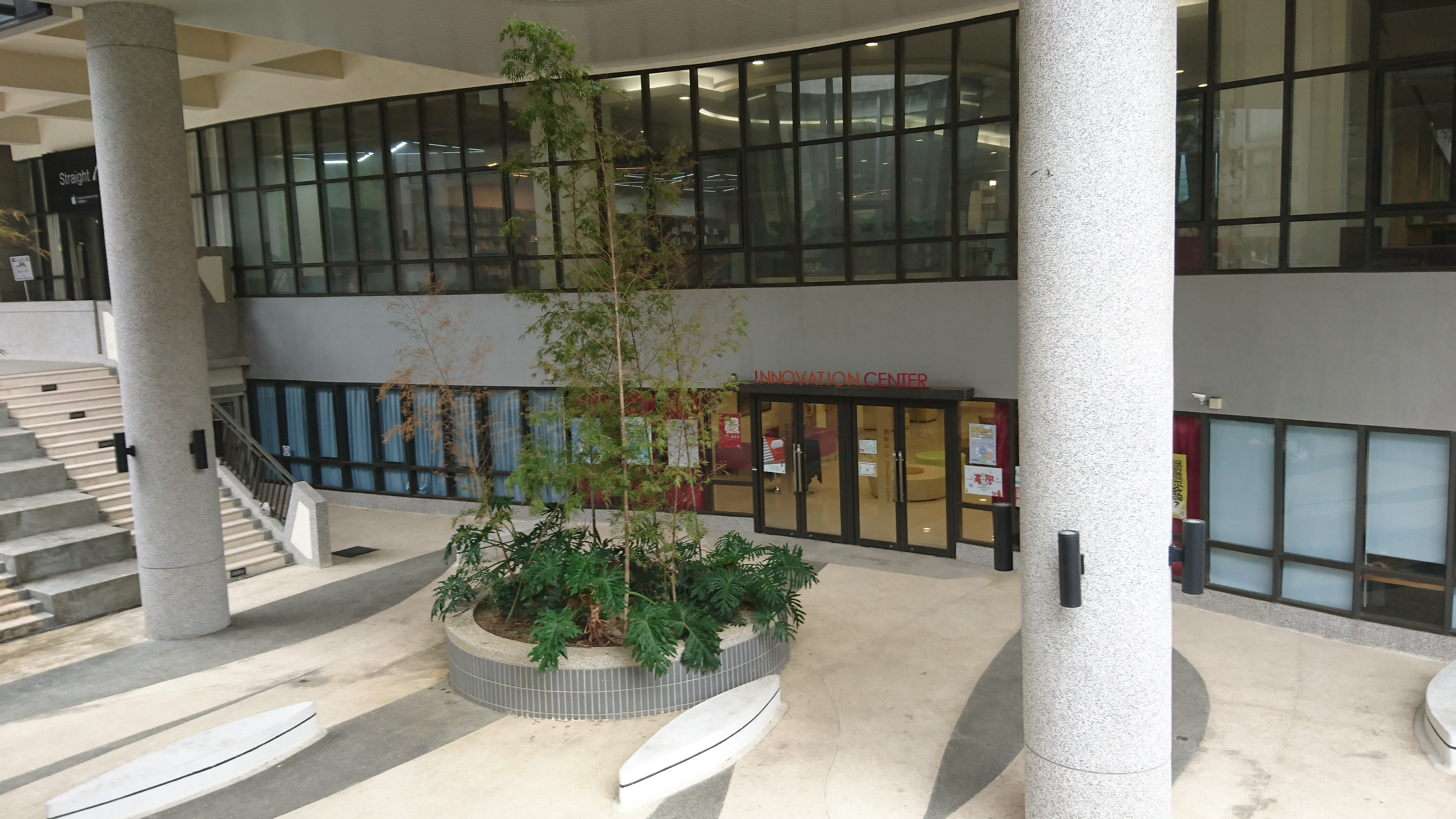 中文（台灣）: 創新創業中心